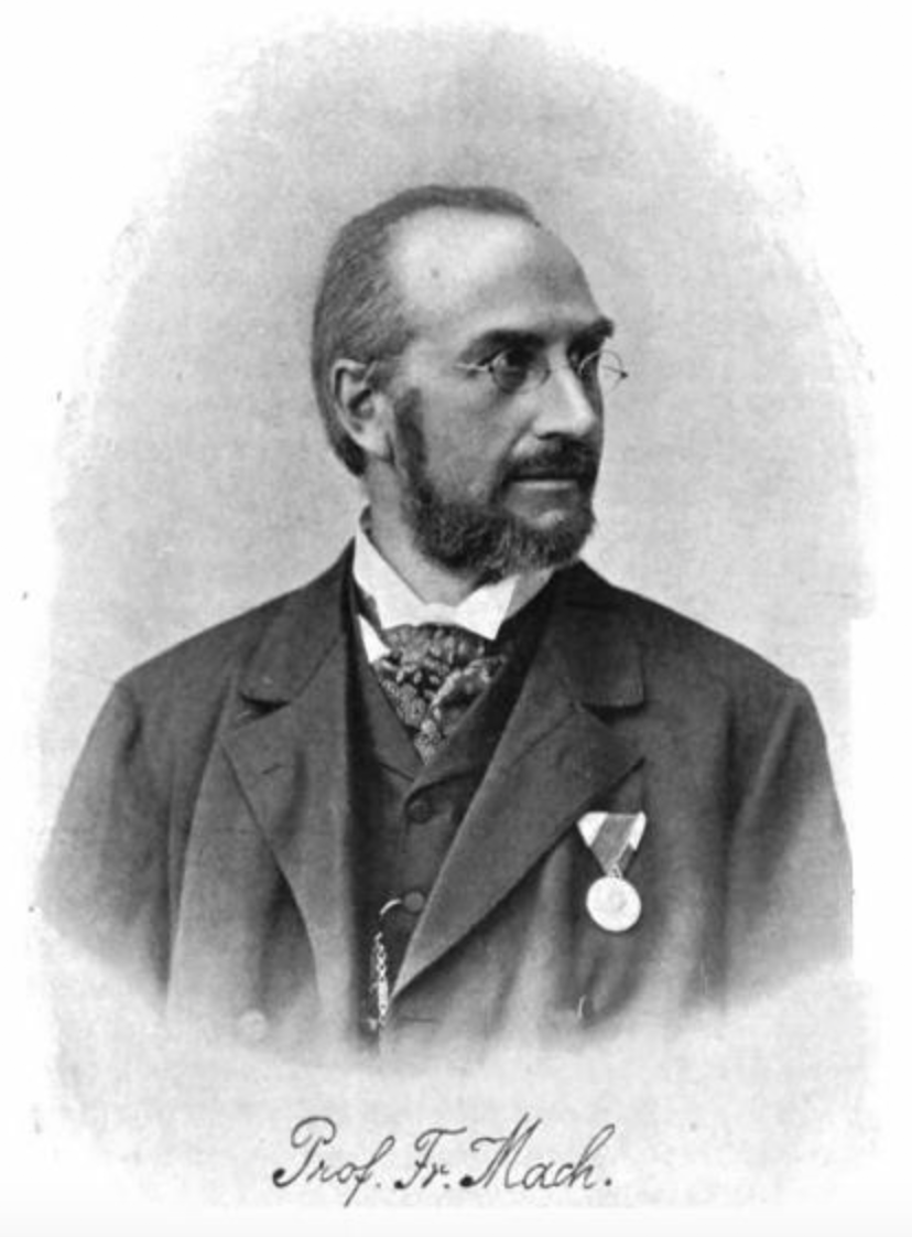 Prof. Franz Mach (1845–1917)